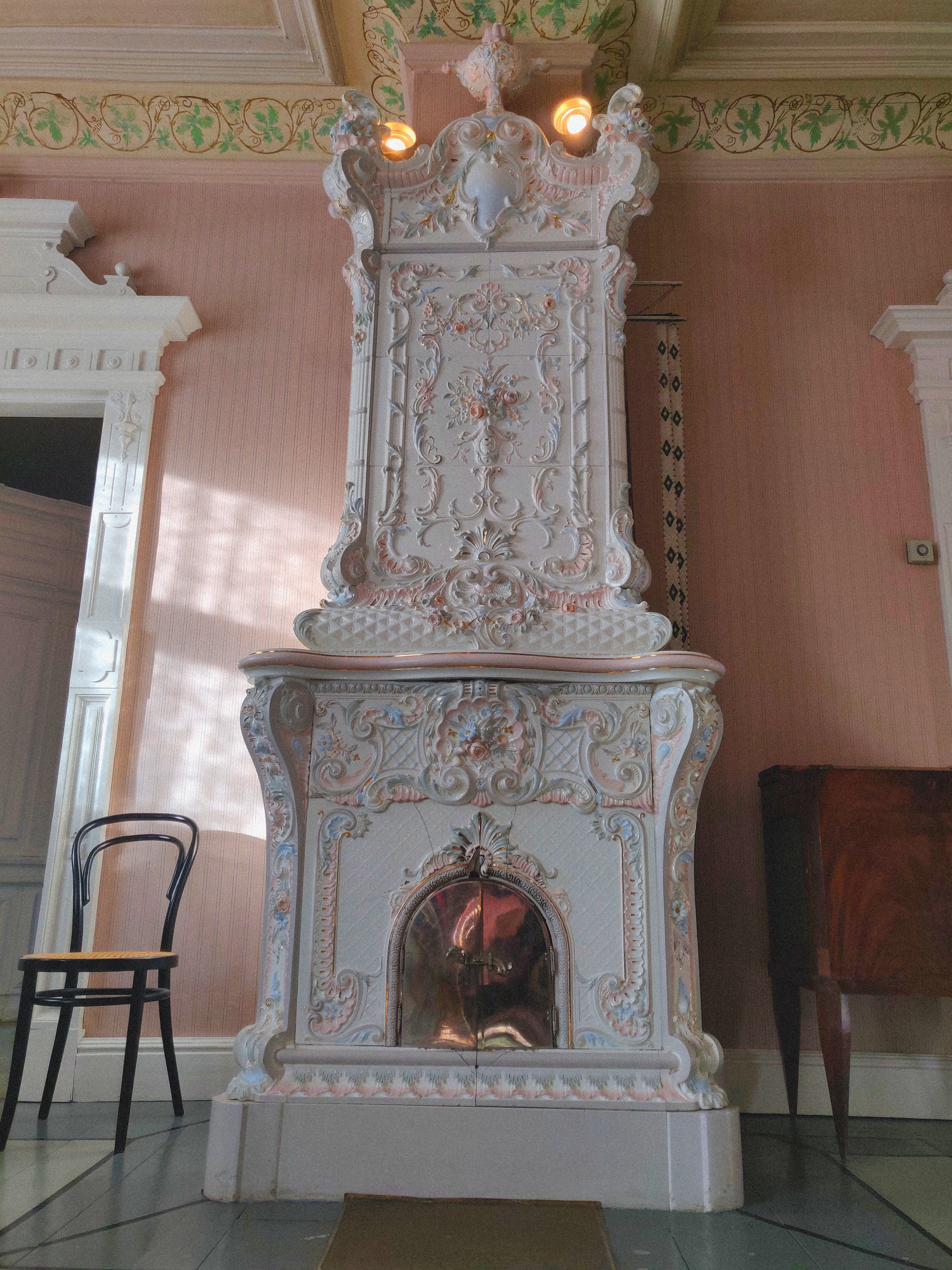 Arabian valmistama kaakeliuuni Marelan salissa.